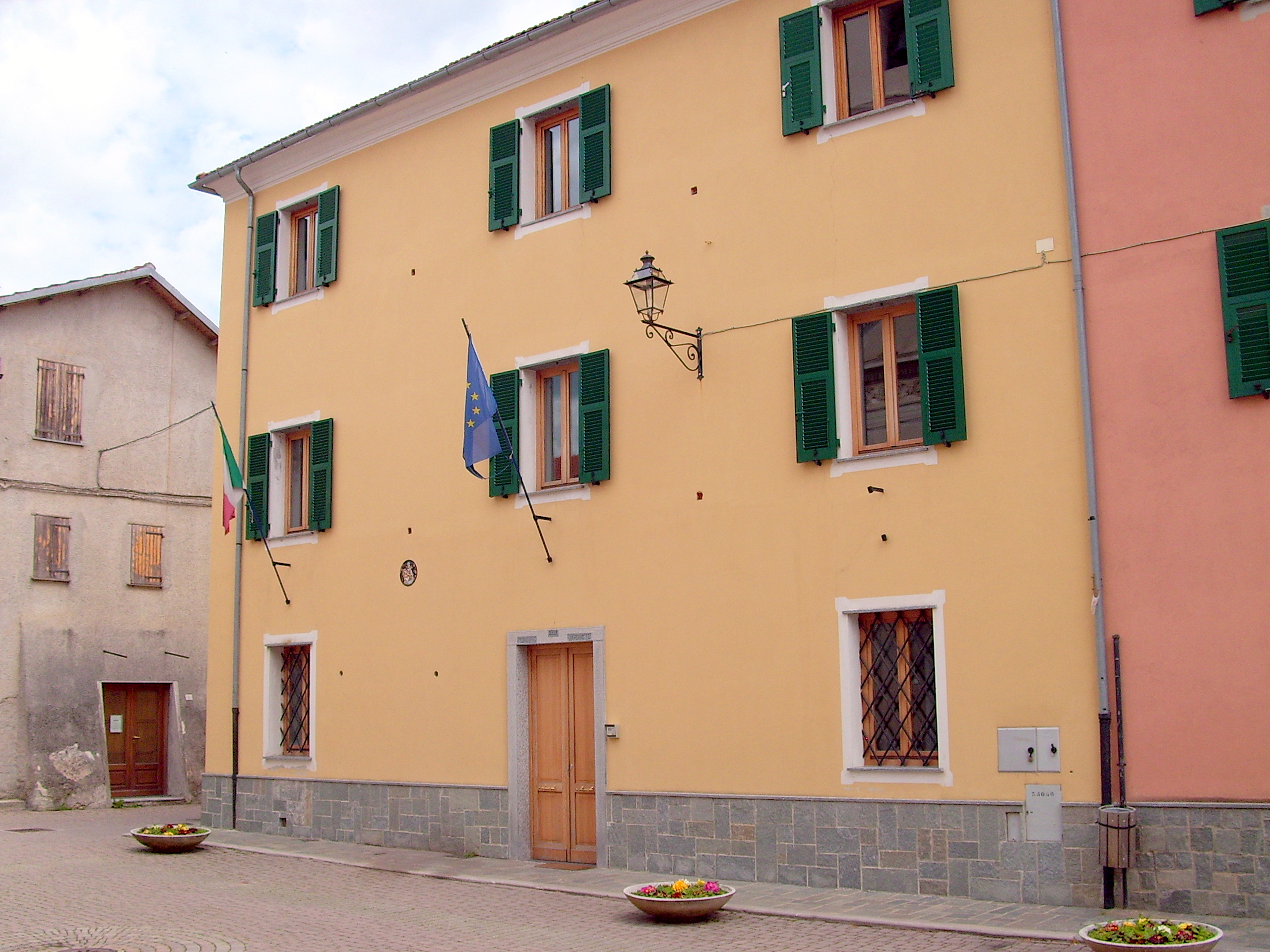 Palazzo Municipale di Bardineto, Liguria, Italia